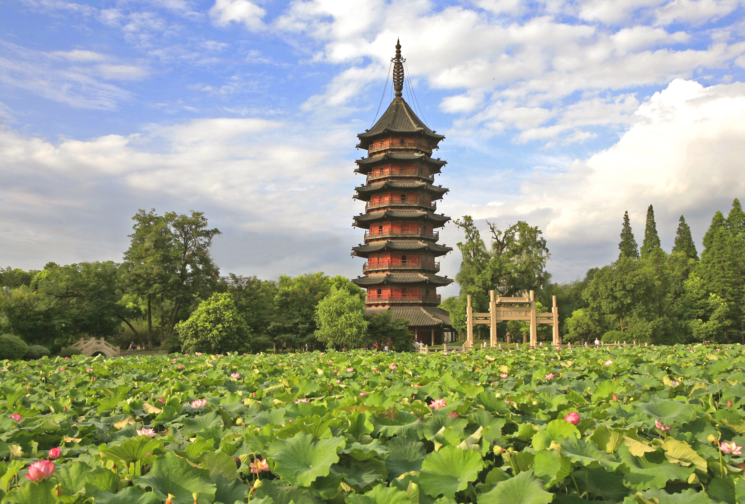 Pagoda Feiying in Huzhou